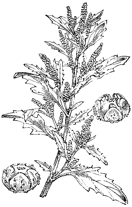 Slika 290. Siva metla [sic!]. (Chenopódium glaucum.)